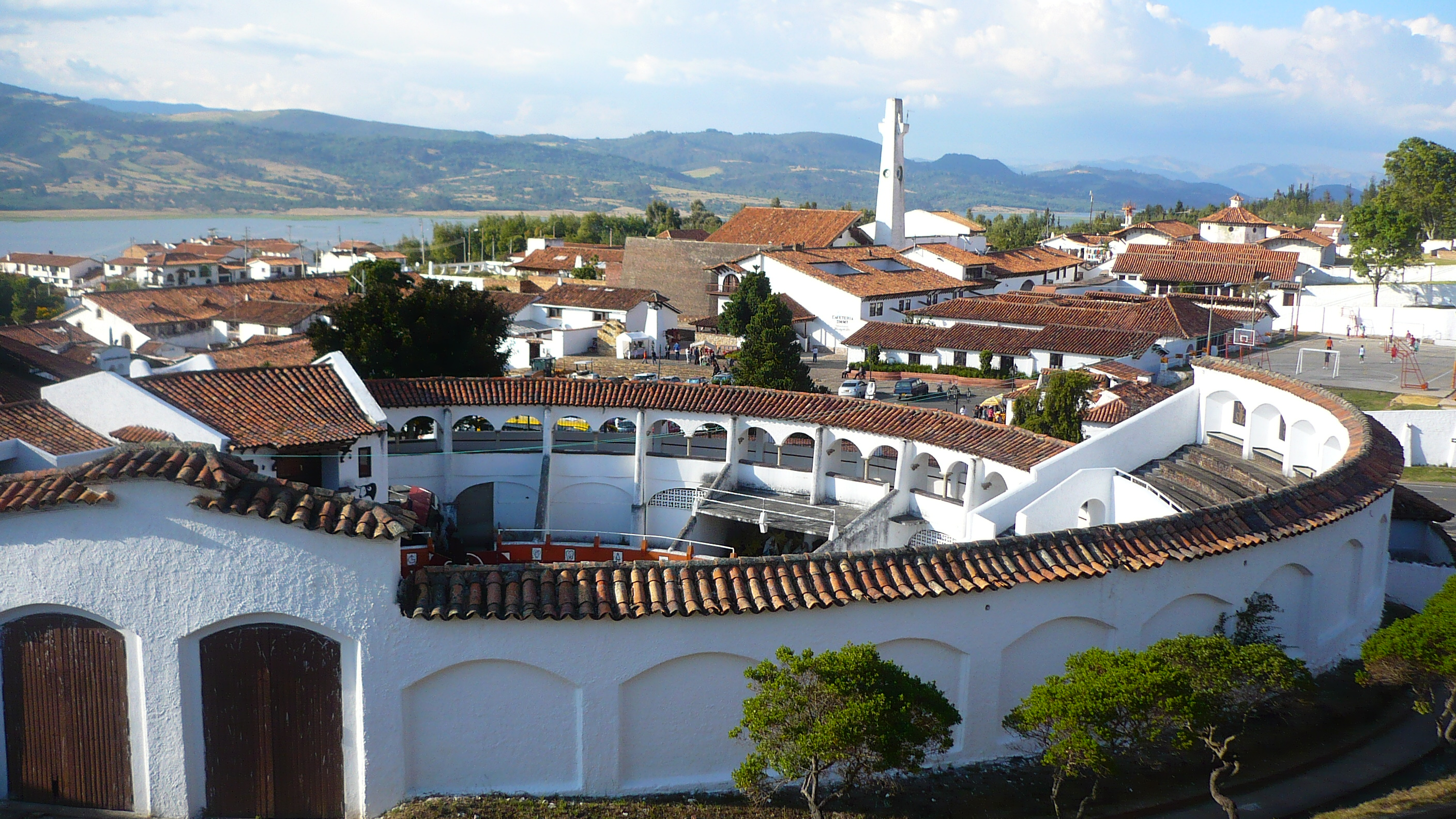 Vue du colisée de Guatavita et de la ville.